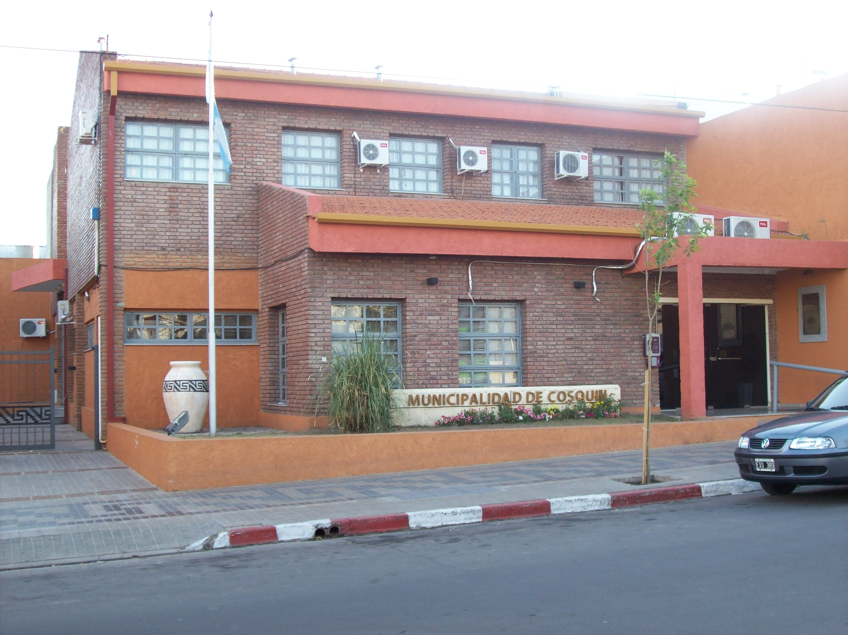 Edificio de la municipalidad en Cosquín, provincia de Córdoba, Argentina.